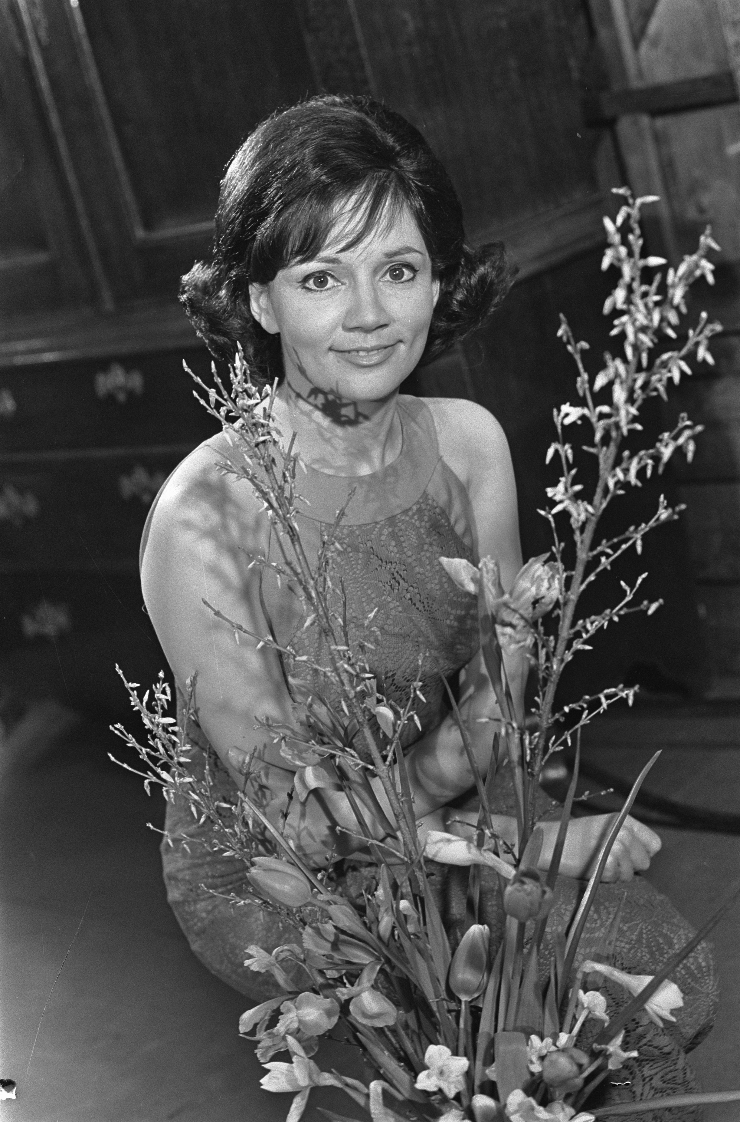 Collectie / Archief : Fotocollectie Anefo Reportage / Serie : [ onbekend ] Beschrijving : Thérèse Steinmetz tijdens repetitie voor Nederlands Songfestival Datum : 22 februari 1967 Trefwoorden : portretten, repetities, songfestivals, zangeressen Persoonsnaam : Steinmetz, Thérèse Fotograaf : Nijs, Jac. de / Anefo, [onbekend] Auteursrechthebbende : Nationaal Archief Materiaalsoort : Negatief (zwart/wit) Nummer archiefinventaris : bekijk toegang 2.24.01.05 Bestanddeelnummer : 920-0999